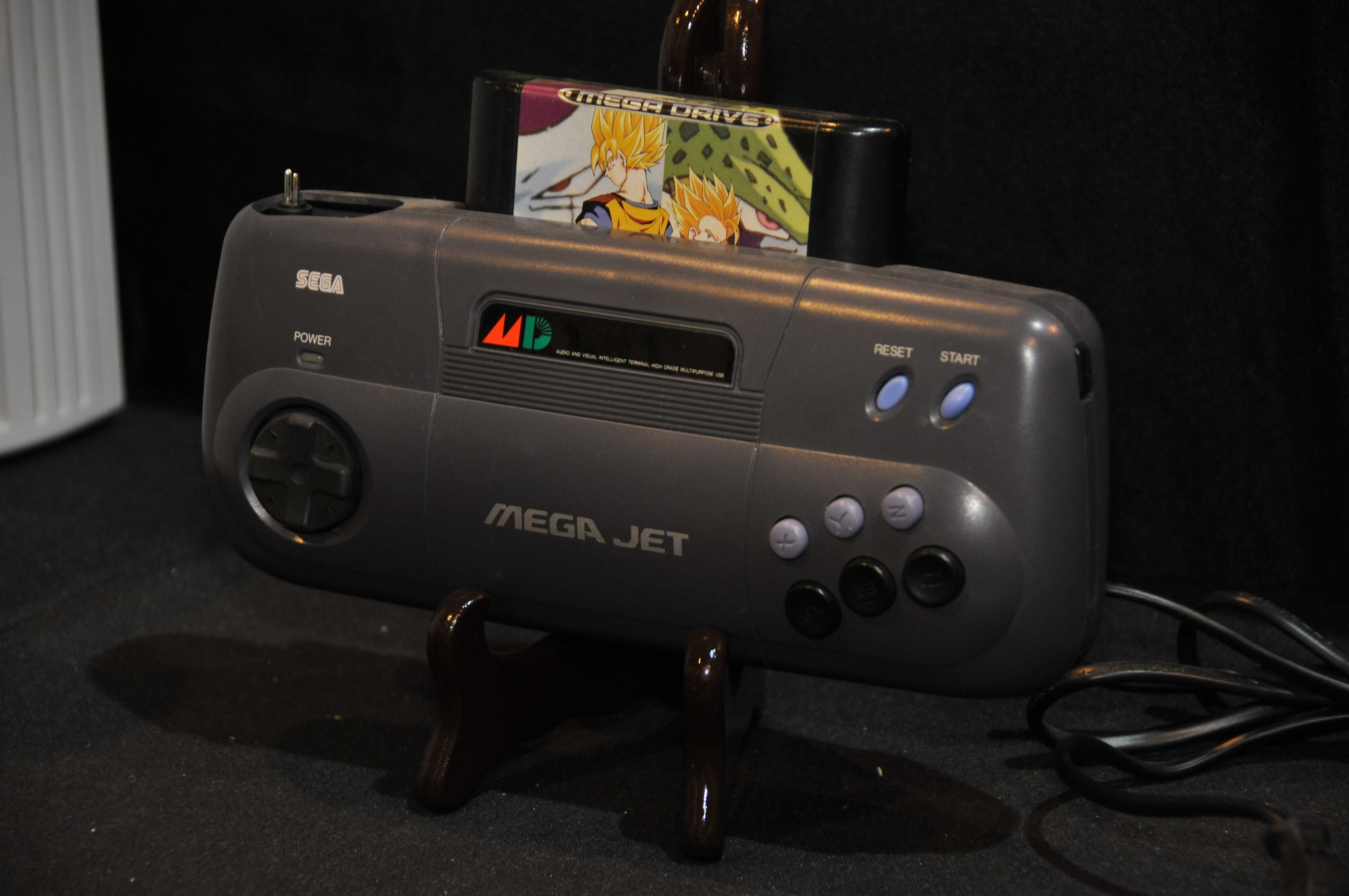 Colección de consolas de Eduardo Álvarez (